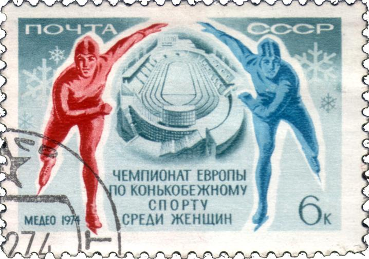 Чемпионат Европы по конькобежному спорту среди женщин Медео 1974